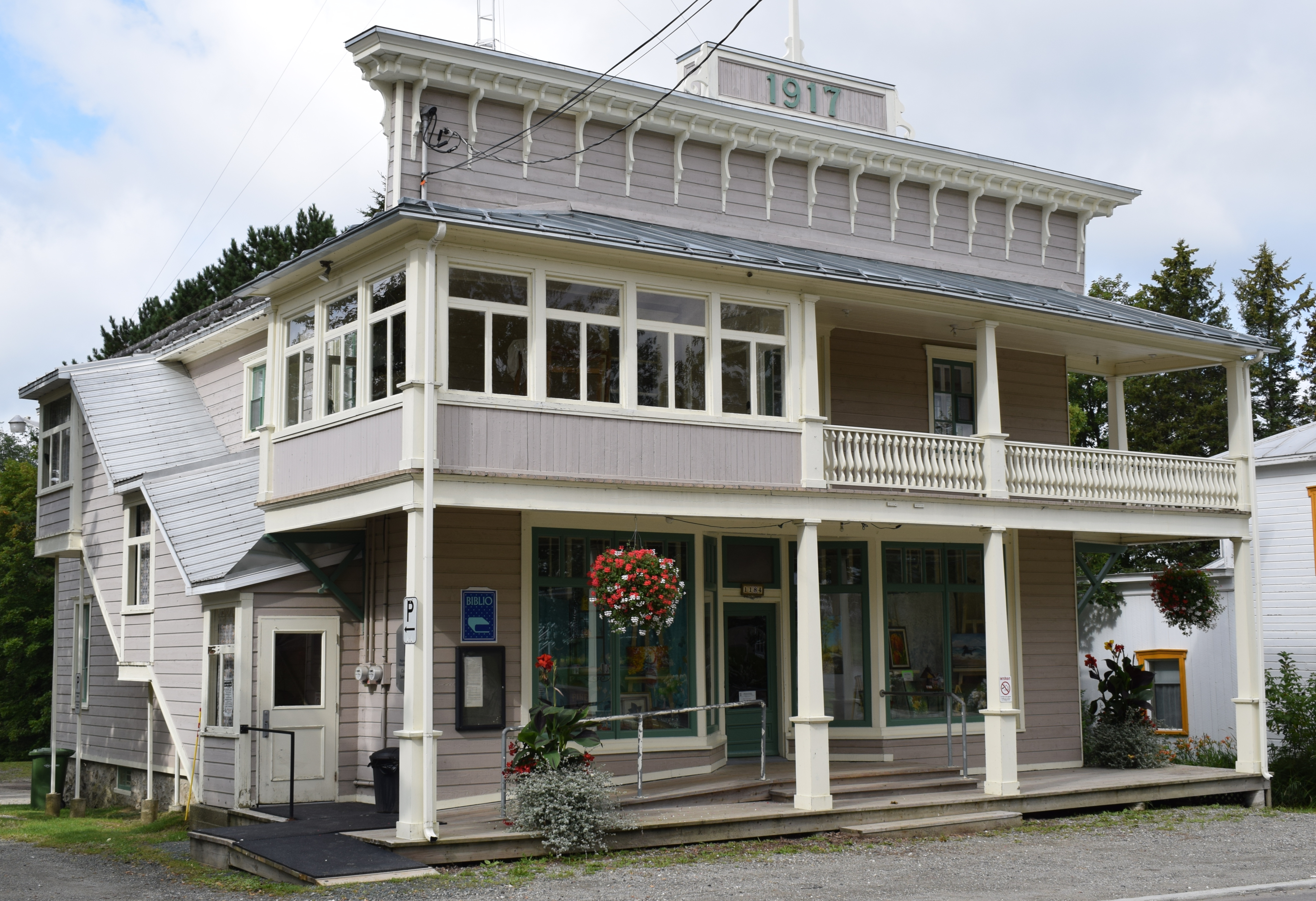 Bibliothèque municipale de Saint-Malachie